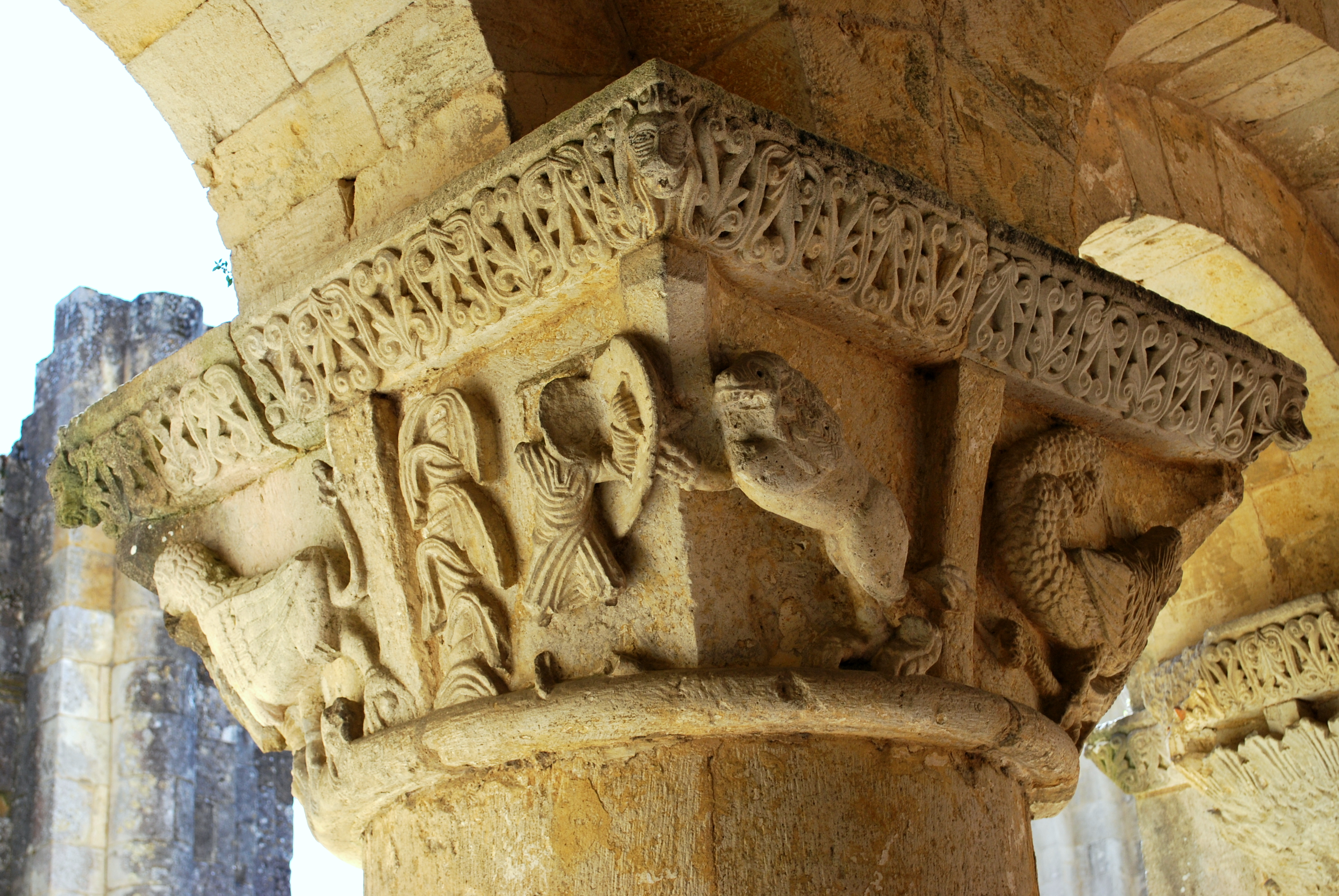 Abbaye de la Sauve-Majeure